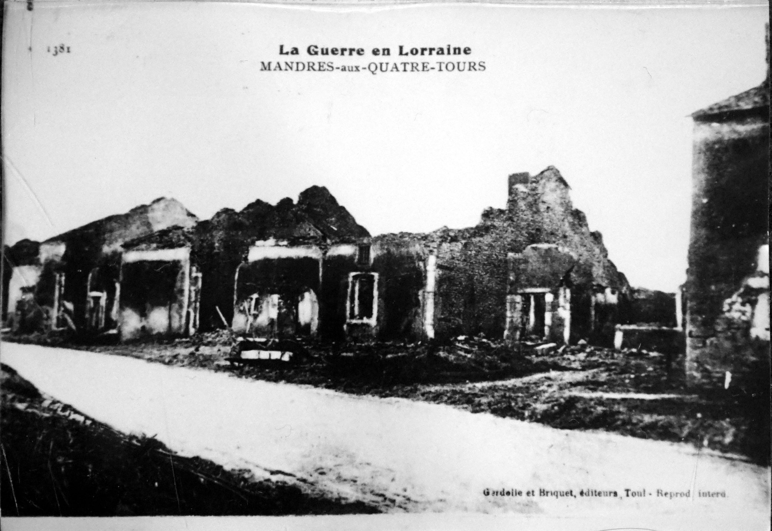 au musée de Toul.